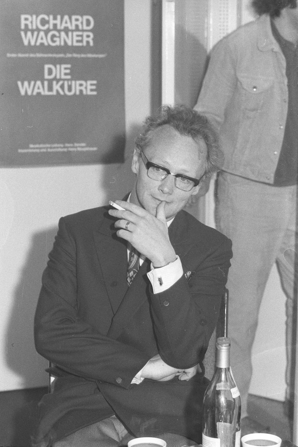 Neuer Generalmusikdirektor Klaus Tennstedt